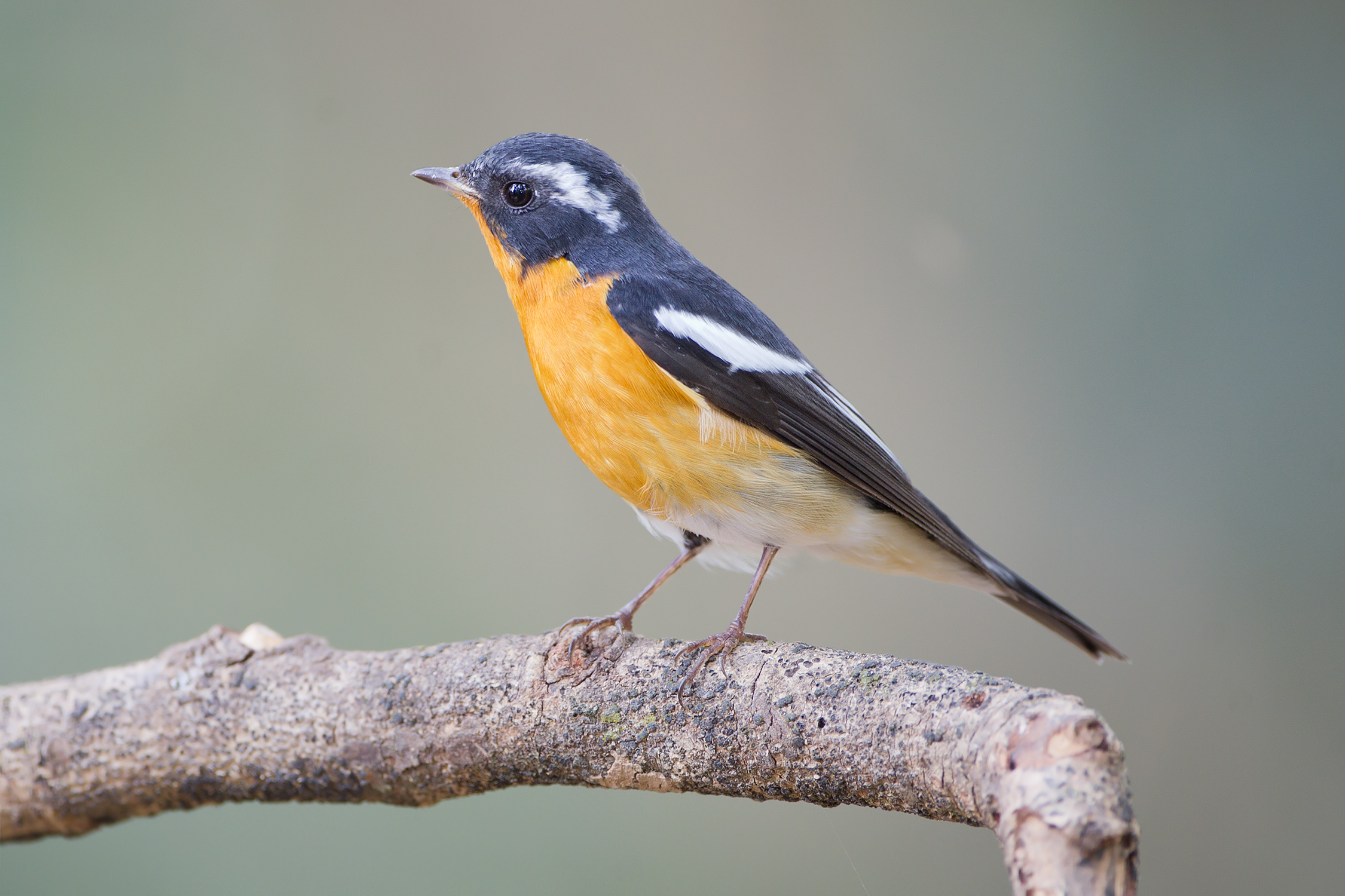 Mugimaki Flycatcher (Ficedula mugimaki), Khao Yai National Park, Nakhon Ratchasima, Thailand